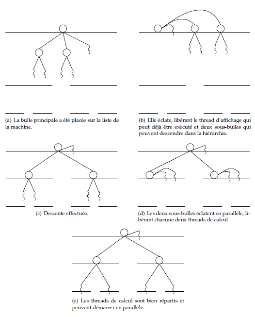 Schéma explicatif de BubbleSched